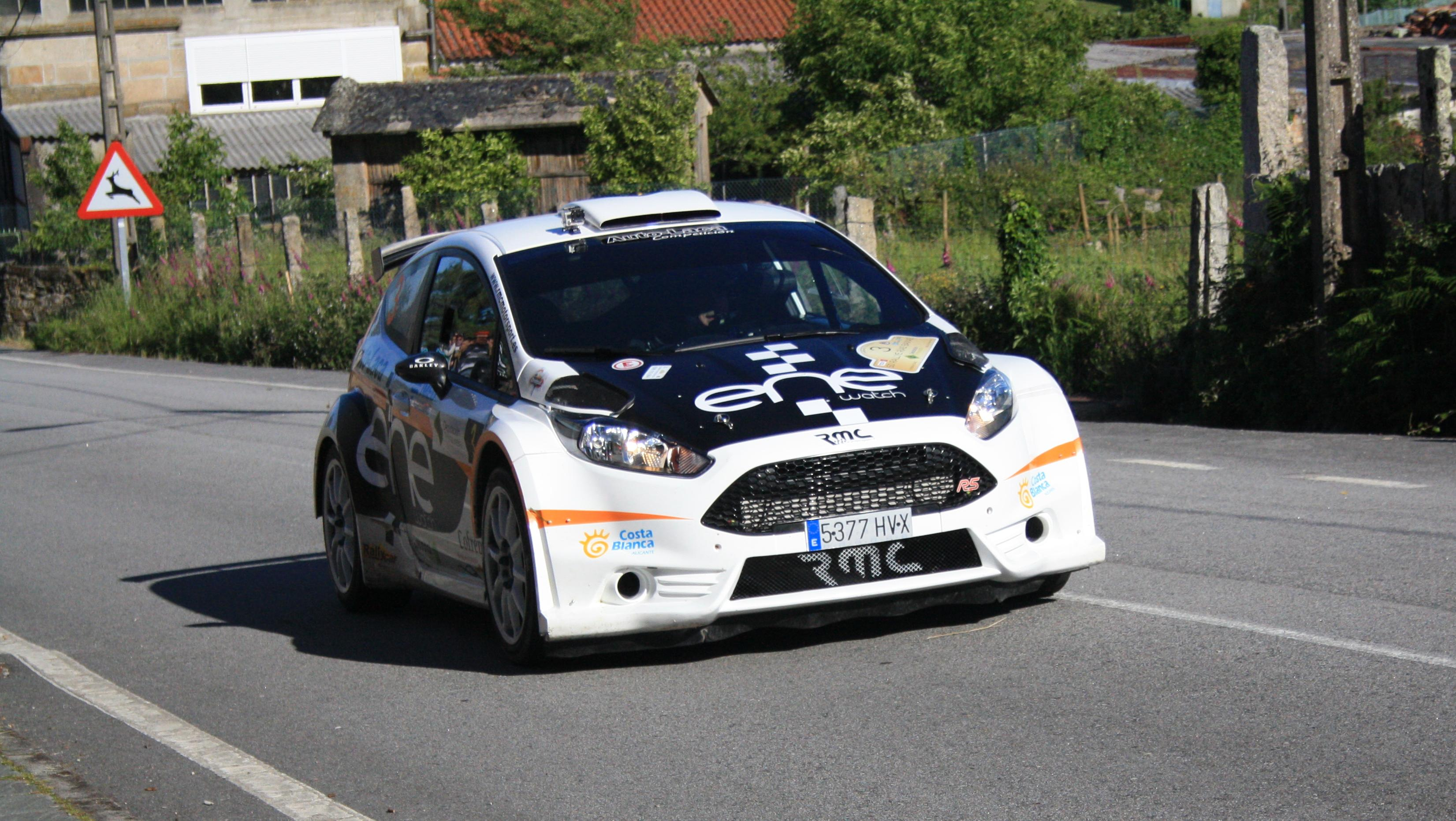 Miguel Ángel Fuster, en Rías Baixas 2014, tramo en Covelo